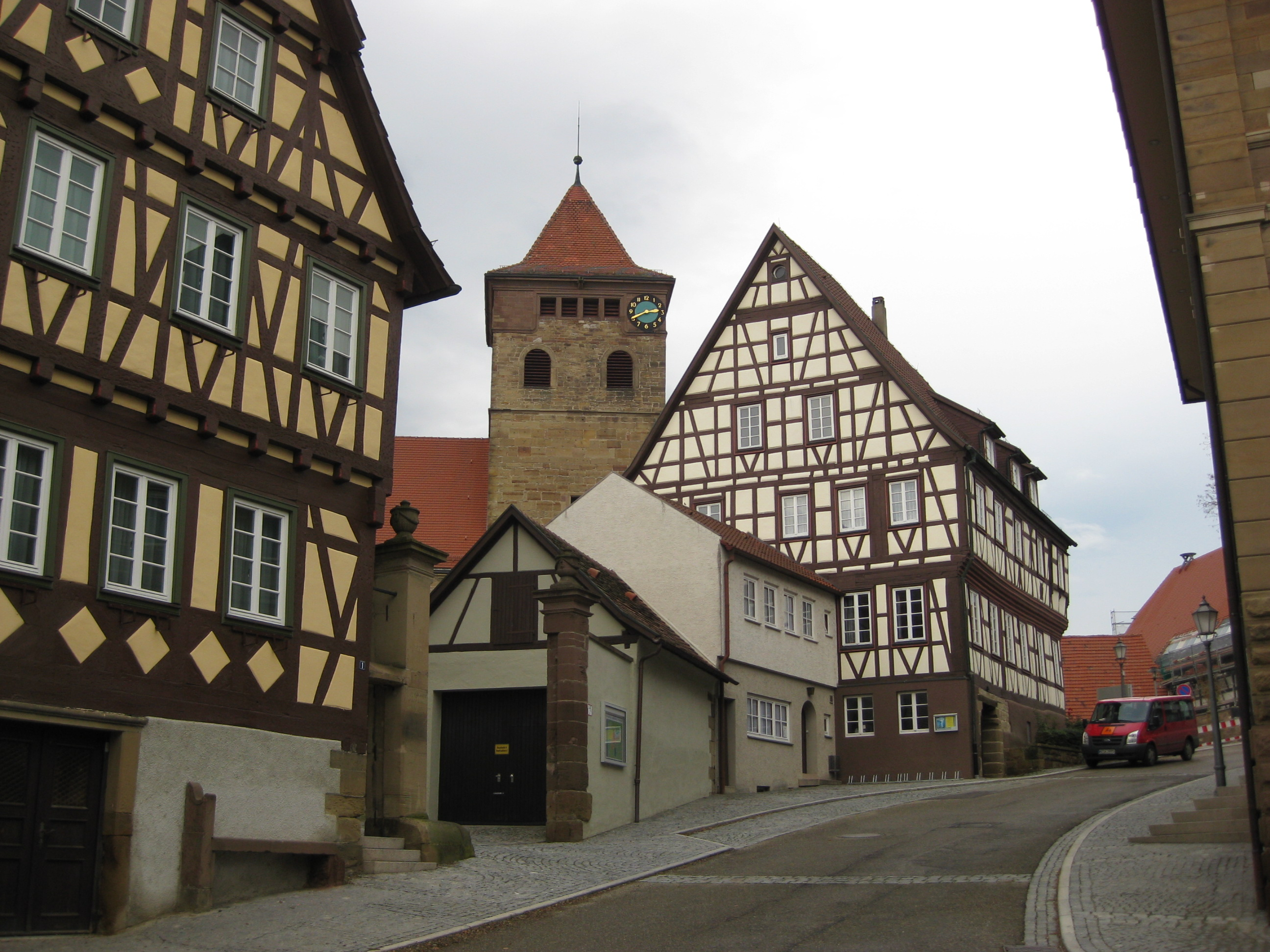 Fachwerk in Ötisheim - Blick von der Alten Mühlacker Straße Richtung Kirchturm.